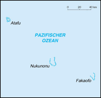 Tokelau